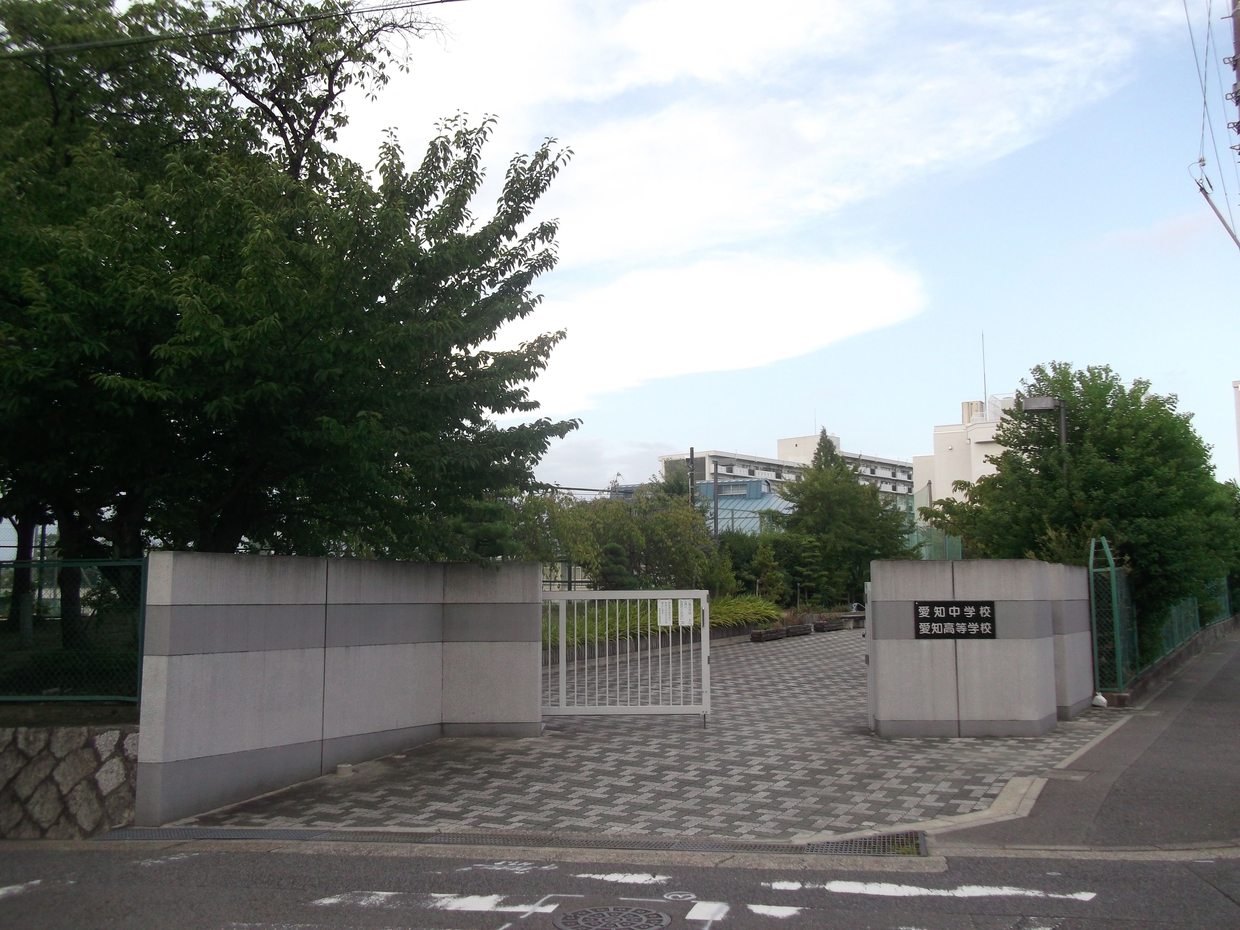 名古屋市千種区光が丘二丁目の愛知中学校・高等学校を南側公道西側より撮影